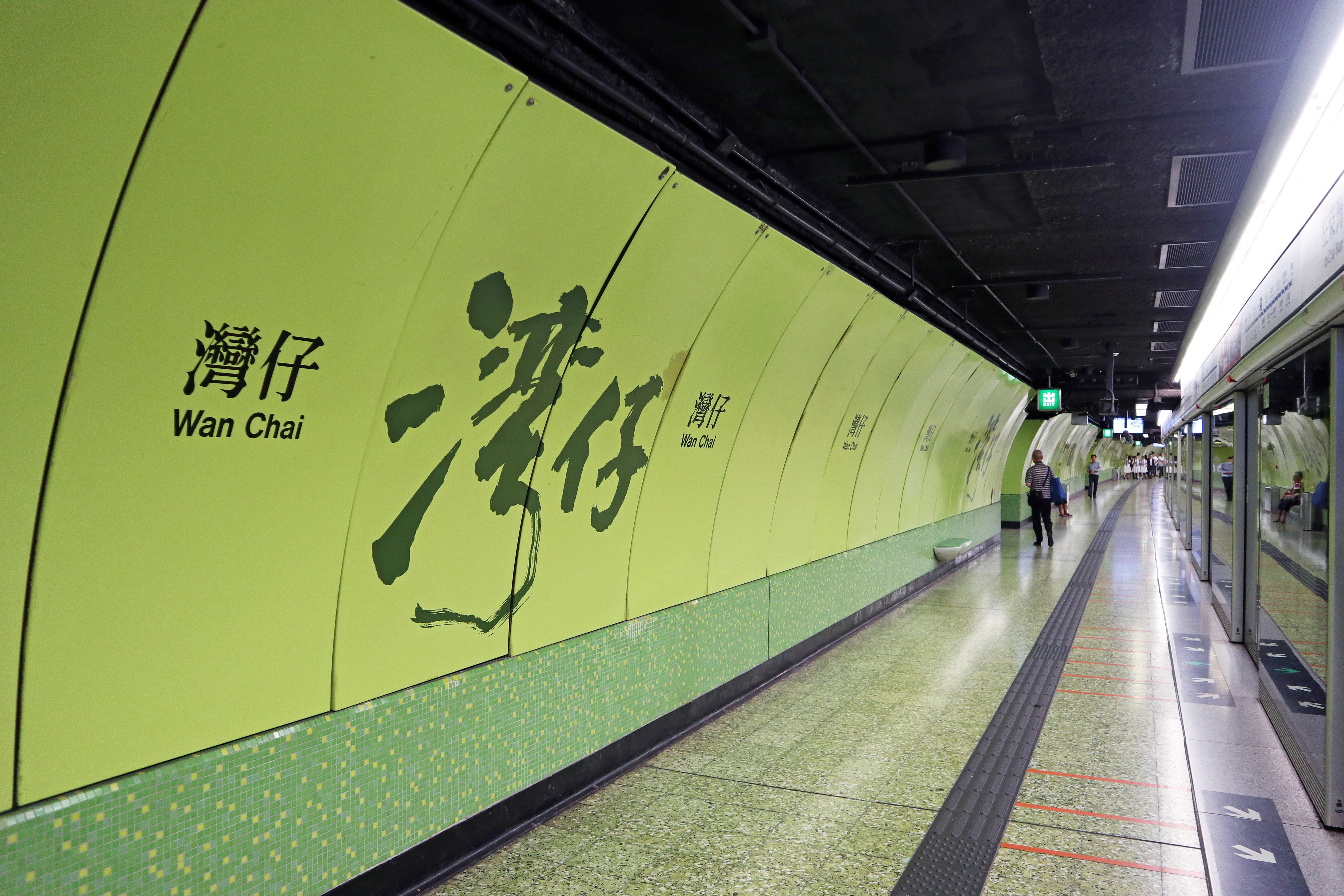 港鐵灣仔站月台